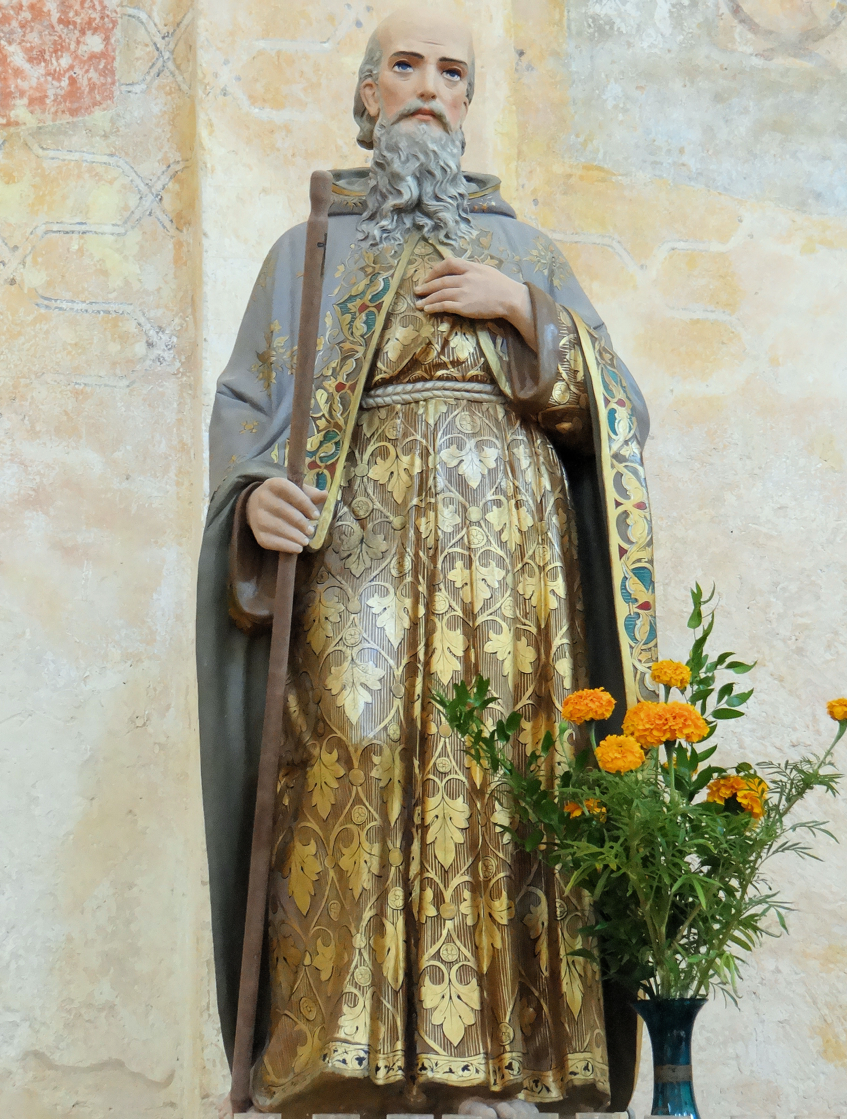 Saint-Avit-Sénieur - Eglise Saint-Avit - L'ermite saint Avit